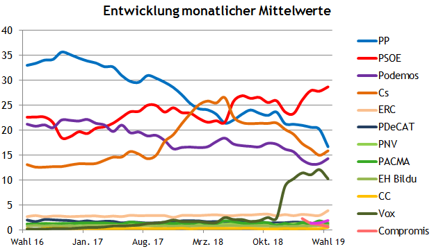 Spanische Parlamentswahl 2019 Umfragen